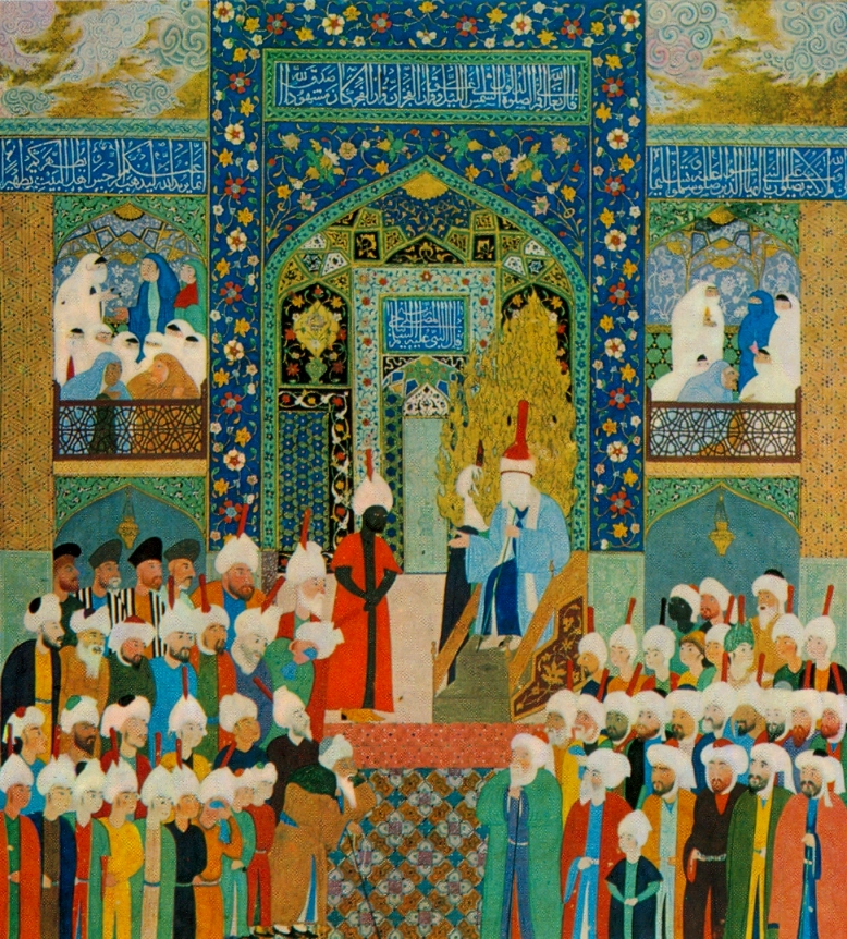 Касим Али. Последняя проповедь пророка Мухаммеда. История